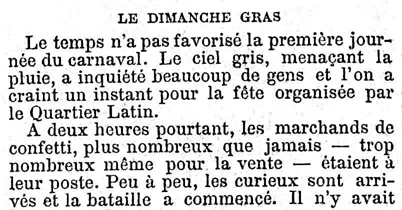 Début de l'article de compte-rendu de la journée du dimanche gras 22 février 1903 au Quartier latin à Paris. Le Figaro, page 4, 3ème colonne.